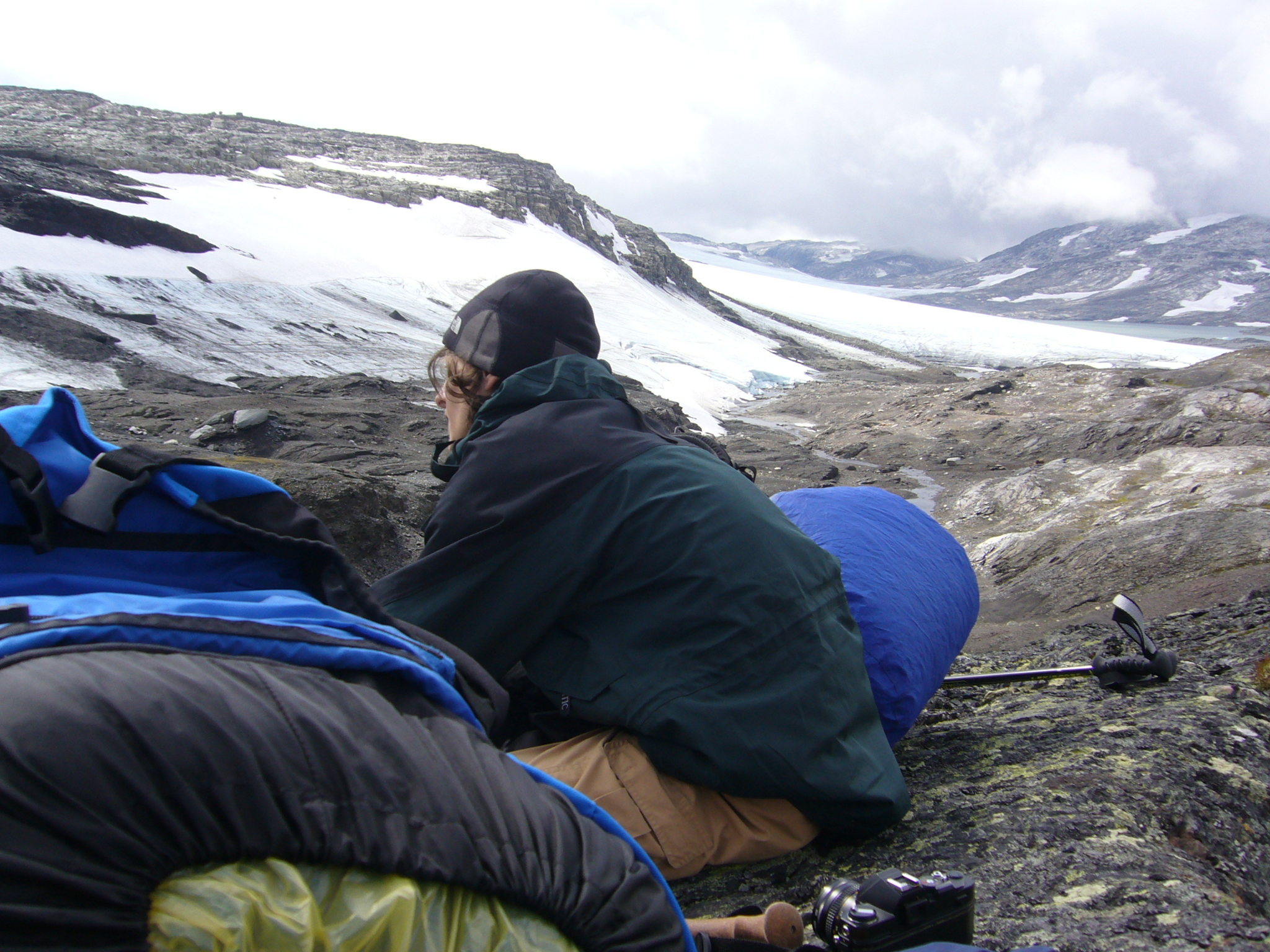 Karge, felsige und nur spärlich bewachsene Landschaft. Meistens nur Moose und Gräser. Ausläufer und Abbruchstellen der Südwestseite des Gletscher "Hardangerjøkulen". Trekking auf der Hochebene. Die dicke Kleidung des Wanderers selbst im Sommer verdeutlicht die klimatischen Bedingungen um den Gletscher. Selbstauslöser, keine nachträgliche Bearbeitung. Kamera und Kameradaten siehe Abschnitt "Metadaten".